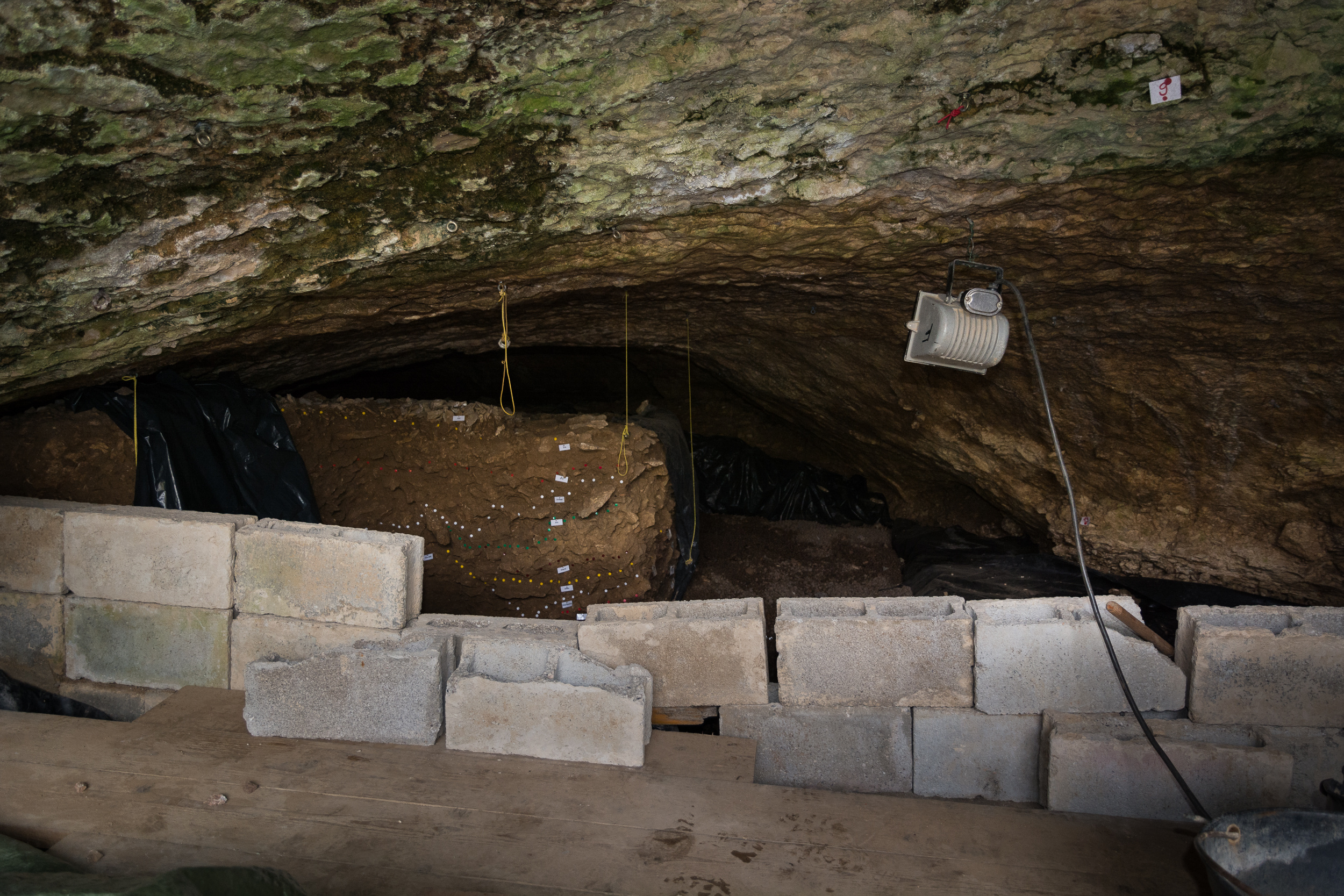 Profil mit Kennzeichnung der Straten im hinteren Bereich der Grotta di Fumane bei Verona in Venetien, Italien.